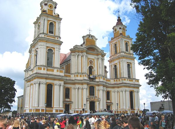 Pobernardyńska Bazylika Wniebowzięcia NMP w Budsławiu.